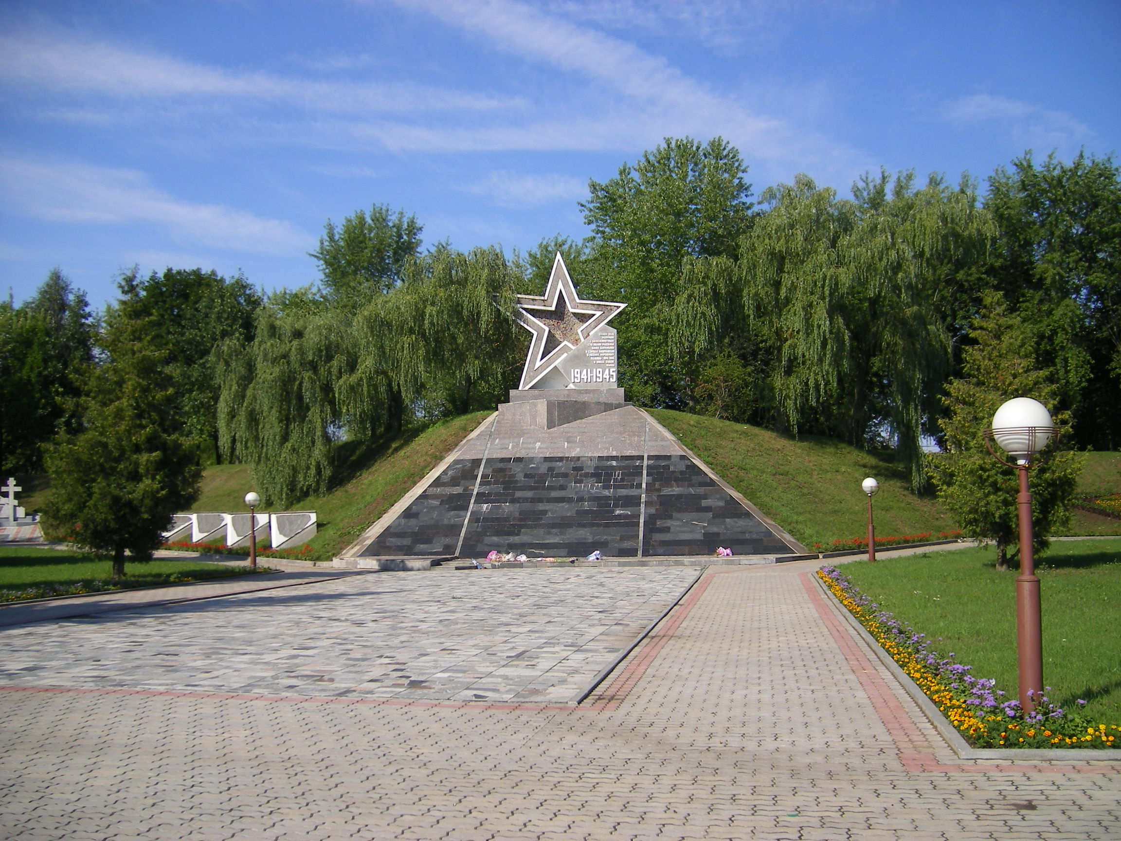 A Nagy Honvédő Háború emlékműve Karelicsiben (Belarusz)